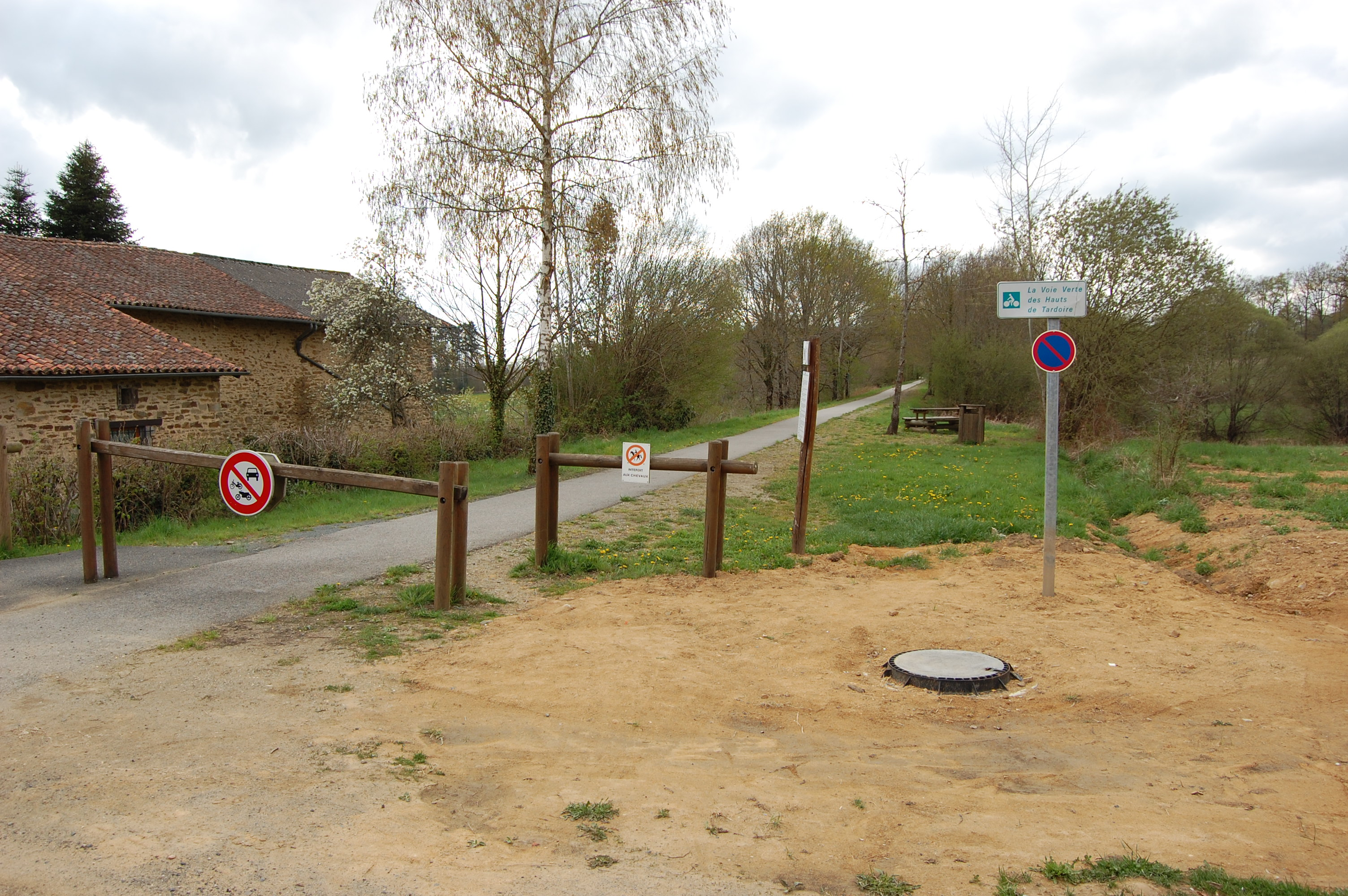 Voie Verte des Hauts de Tardoire à hauteur de Champagnac (Haute-Vienne), en direction de Châlus